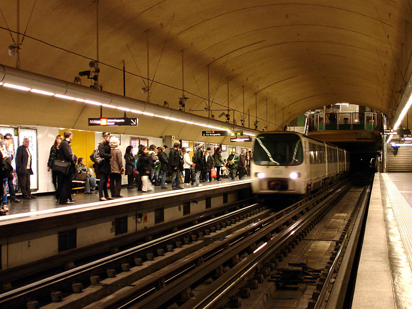 Station Castellane du métro de Marseille, France.